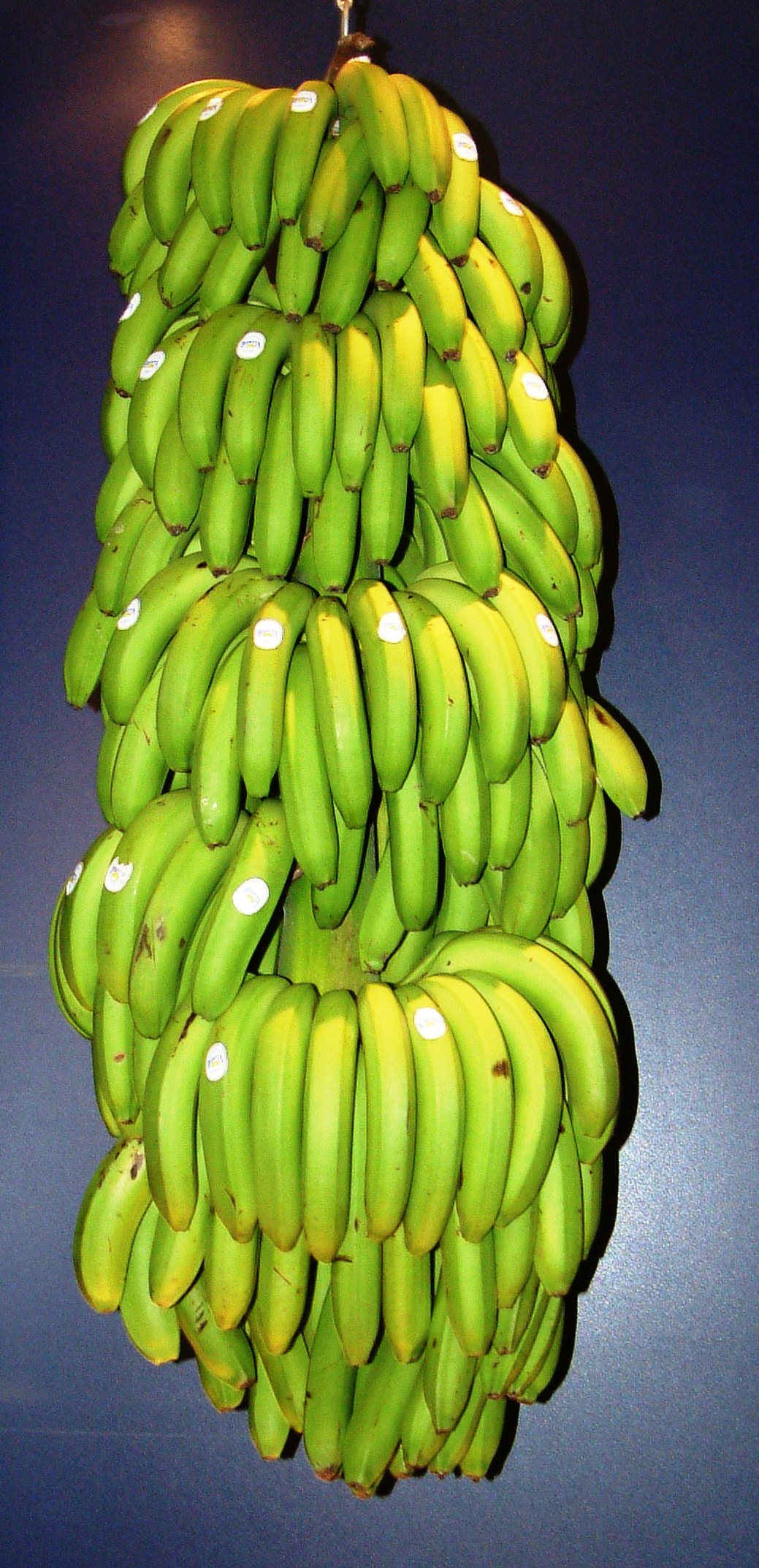 Staude grünrt Bananen